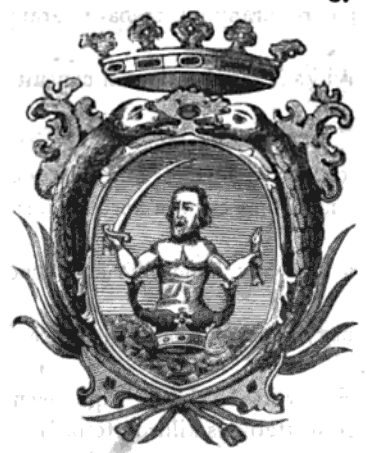 Fischer család (Nagy-szalatnyai, báró) címere